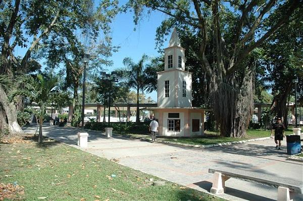 Ciudad de Choloma